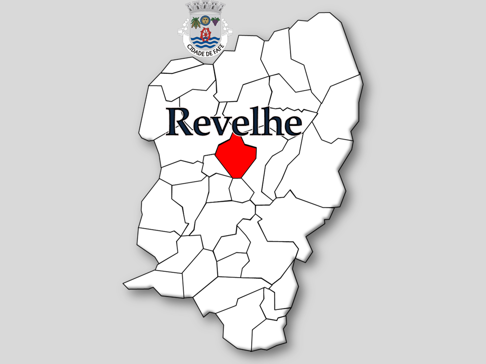 Censos 1864/2011